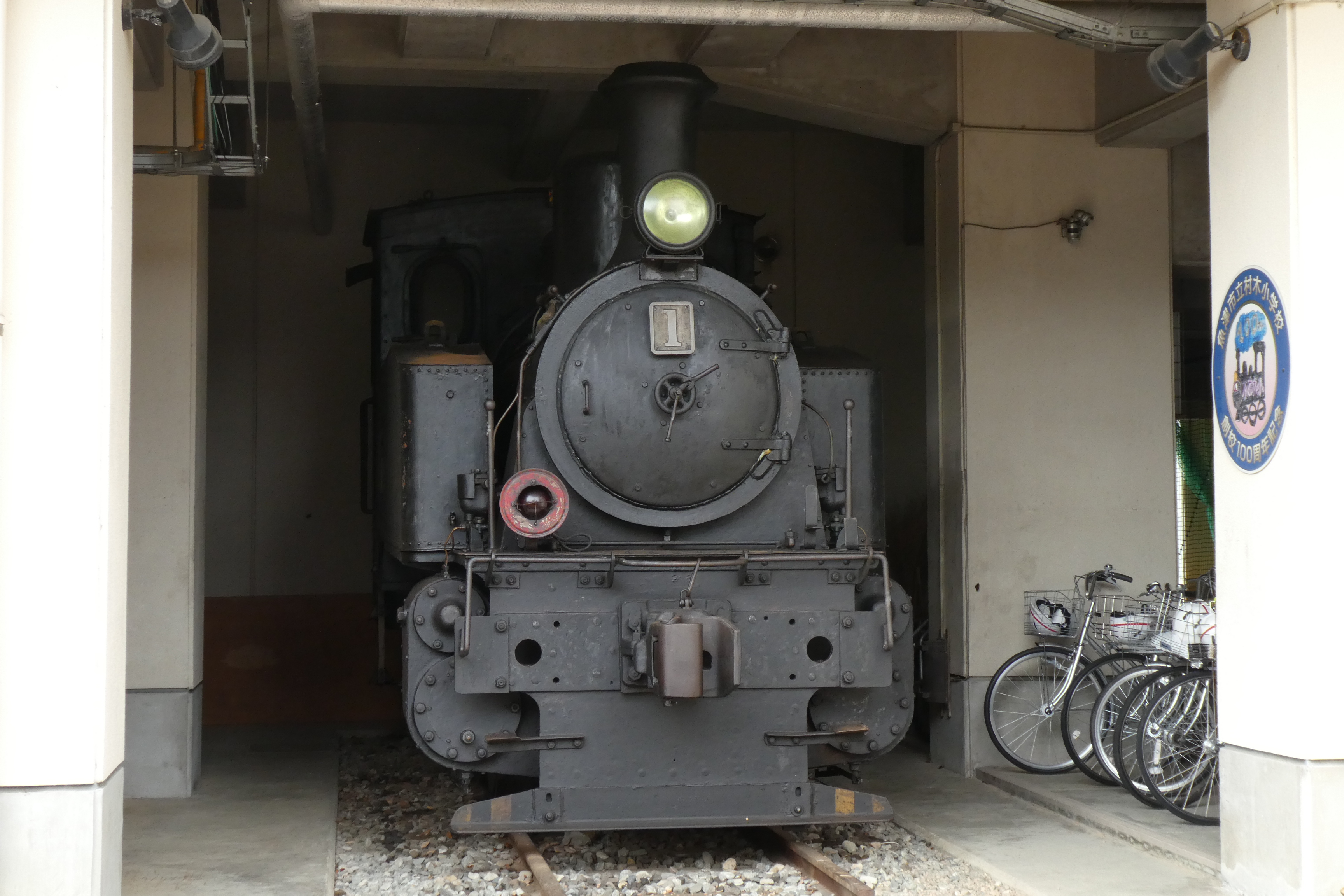 魚津市教育センター・村木公民館（旧 富山県魚津市立村木小学校）で静態保存されている1245形蒸気機関車。日本カーバイド工業1号機（旧 鹿島参宮鉄道1号機）。